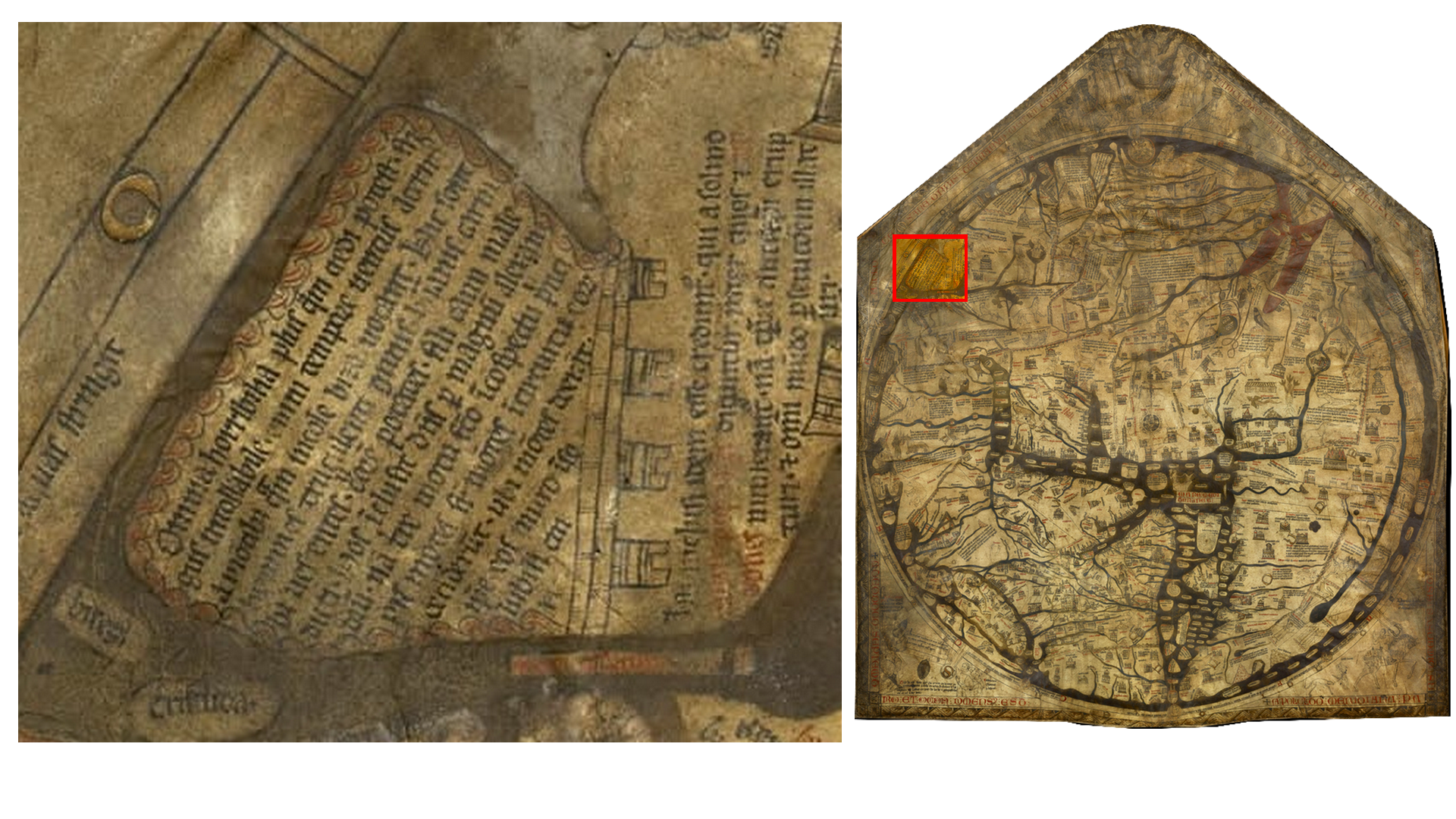 L'hostile territoire des peuples de Gog et Magog représenté ici sur le carte de Hereford.